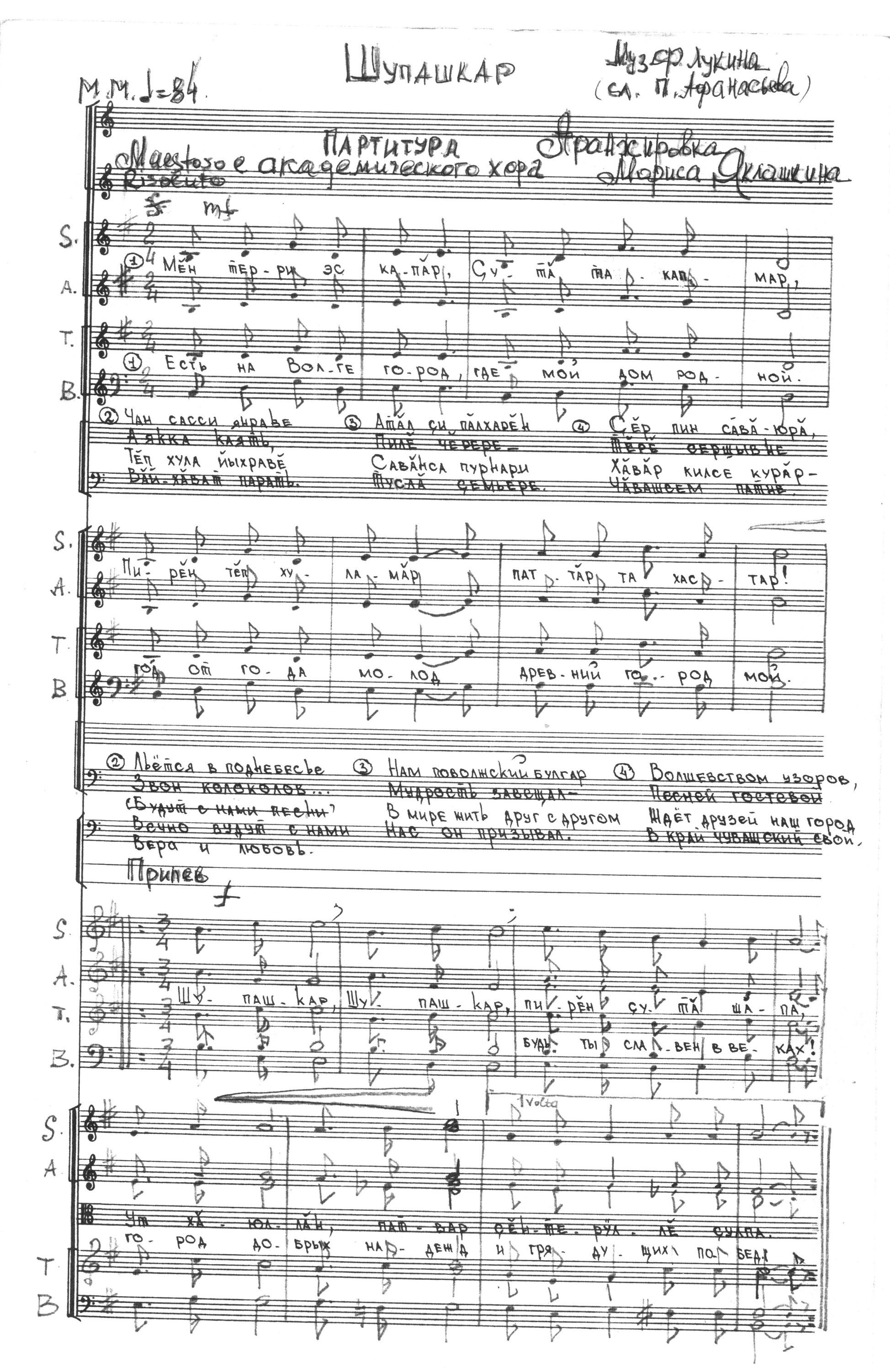 Гимн города Чебоксары, принятый 24 декабря 2009 года. Слова П. В. Афанасьева, музыка Ф. М. Лукина. Рукописный вариант